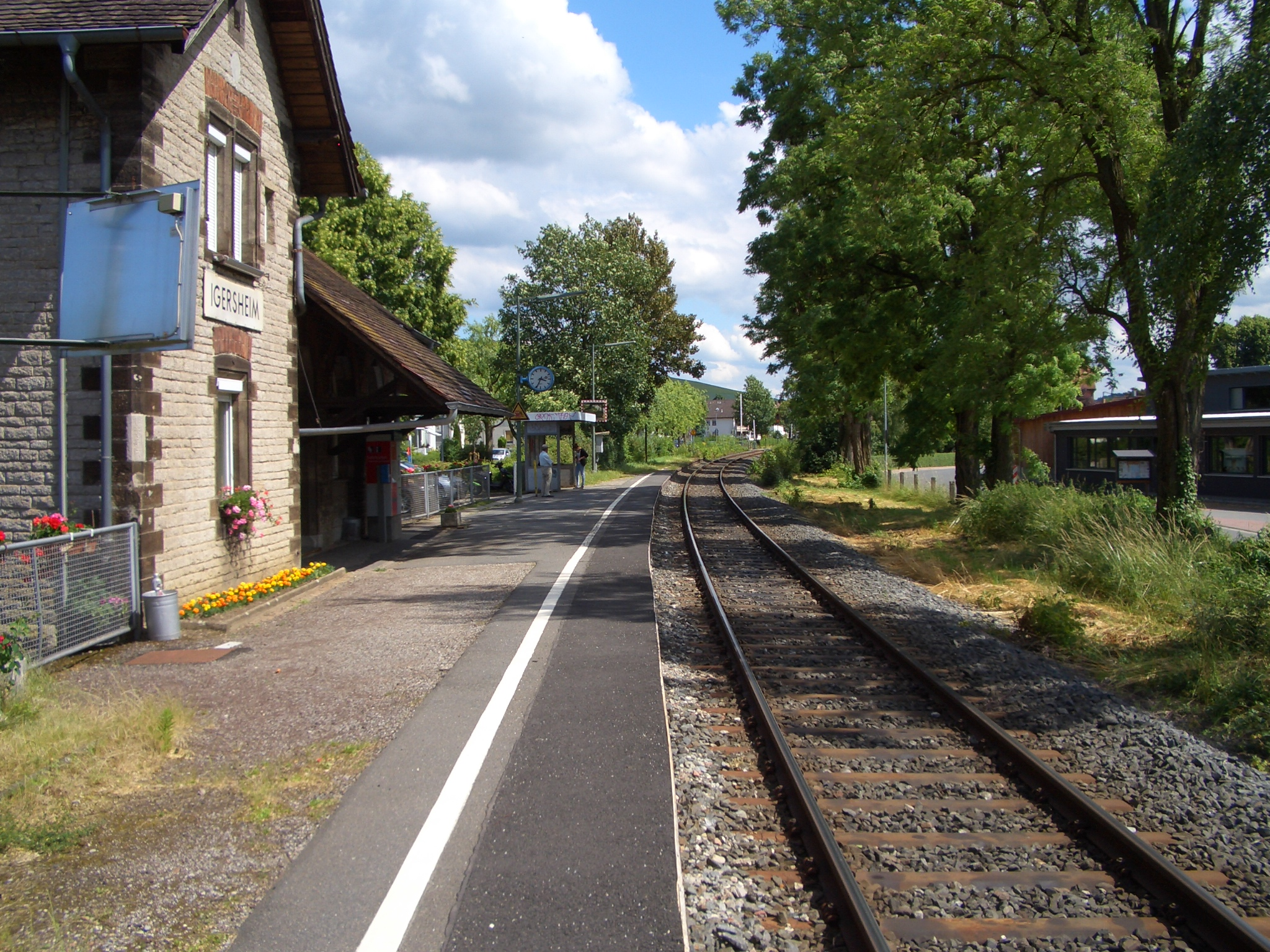 Igersheim, Haltestelle